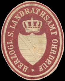 Sealing stamp Title: H.S. Landrathsamt Ohrdruf Description: braun, weiß, geprägt Place: Ohrdruf size: 4x3 cm